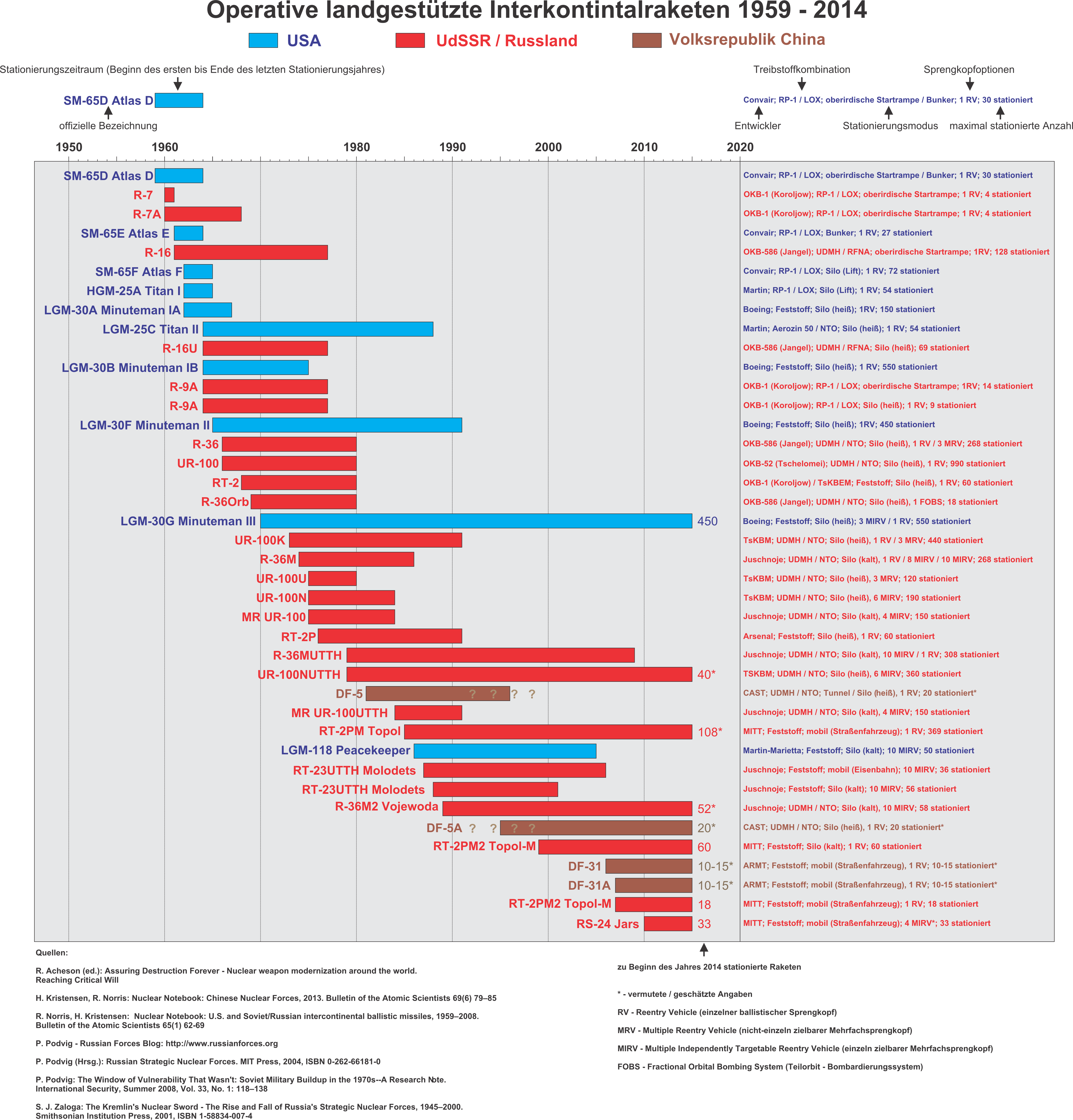 Operative Interkontinentalraketen 1959-2014